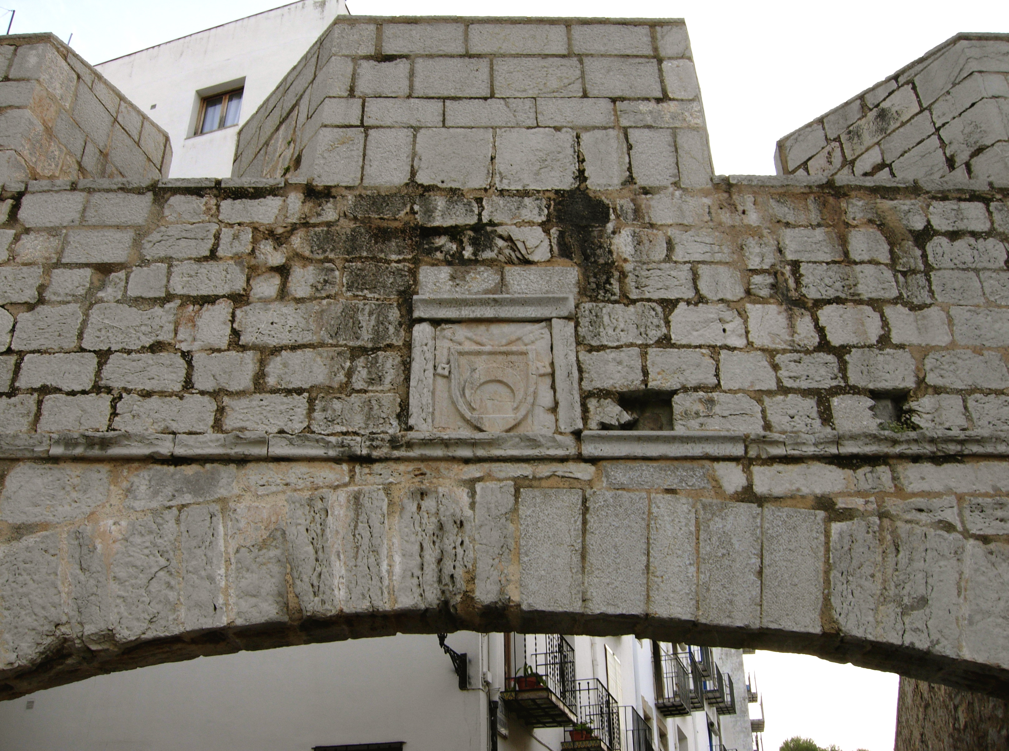 Peñiscola - Portal de Sant Pere - armes du Pape Luna.